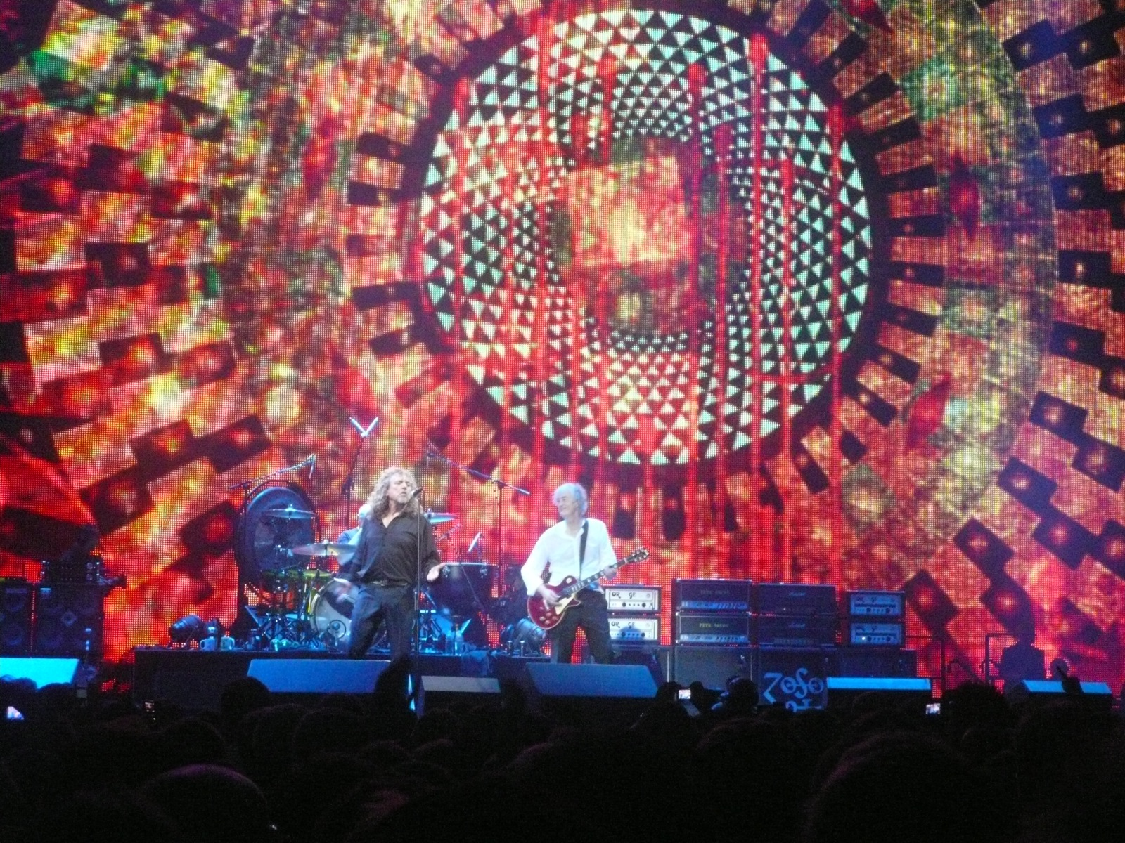 Led Zeppelin